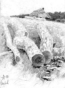 Село Шубков